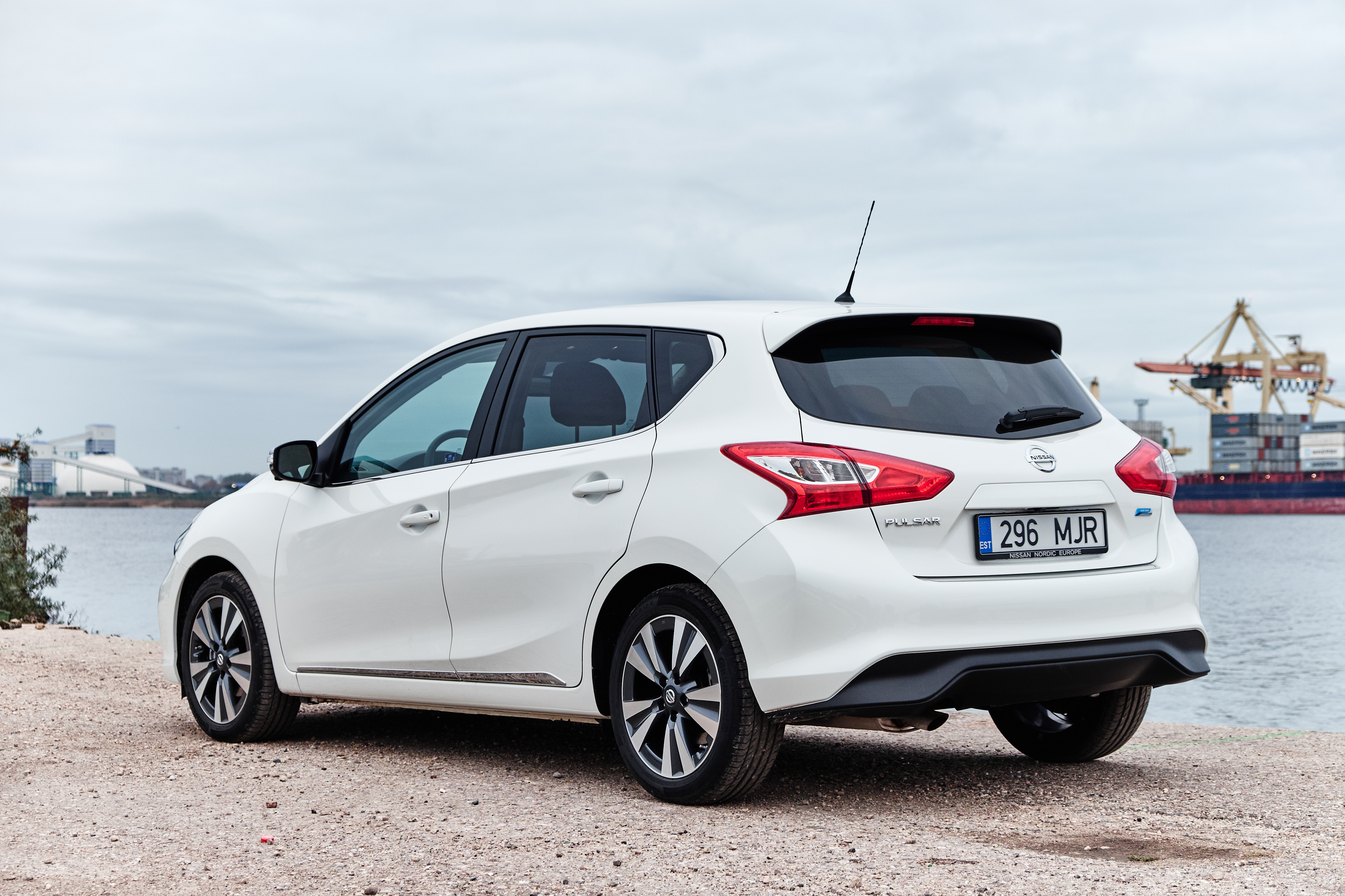 Nissan Pulsar 2014